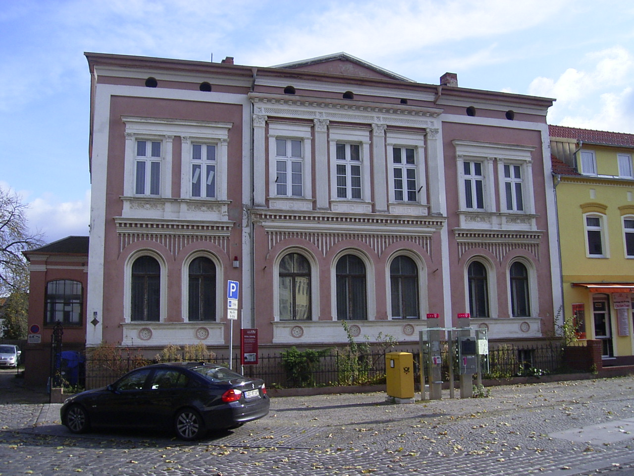 Die Villa Lessig (auch Villa Perponcher genannt) in der Eisenbahnstraße in Fürstenwalde/Spree wurde um 1870 erbaut. Lange Jahre bewohnte sie Graf Wilhelm Perponcher, ein Offizier des örtlichen Ulanenregiments. Nach dem Ersten Weltkrieg kaufte Emil Lässig das Haus. Im Keller betrieb er eine Limonadenfabrik und -abfüllanlage, während er in den oberen Geschossen wohnte. Fabrik und Vertrieb wurden Anfang der 1960er Jahre eingestellt.